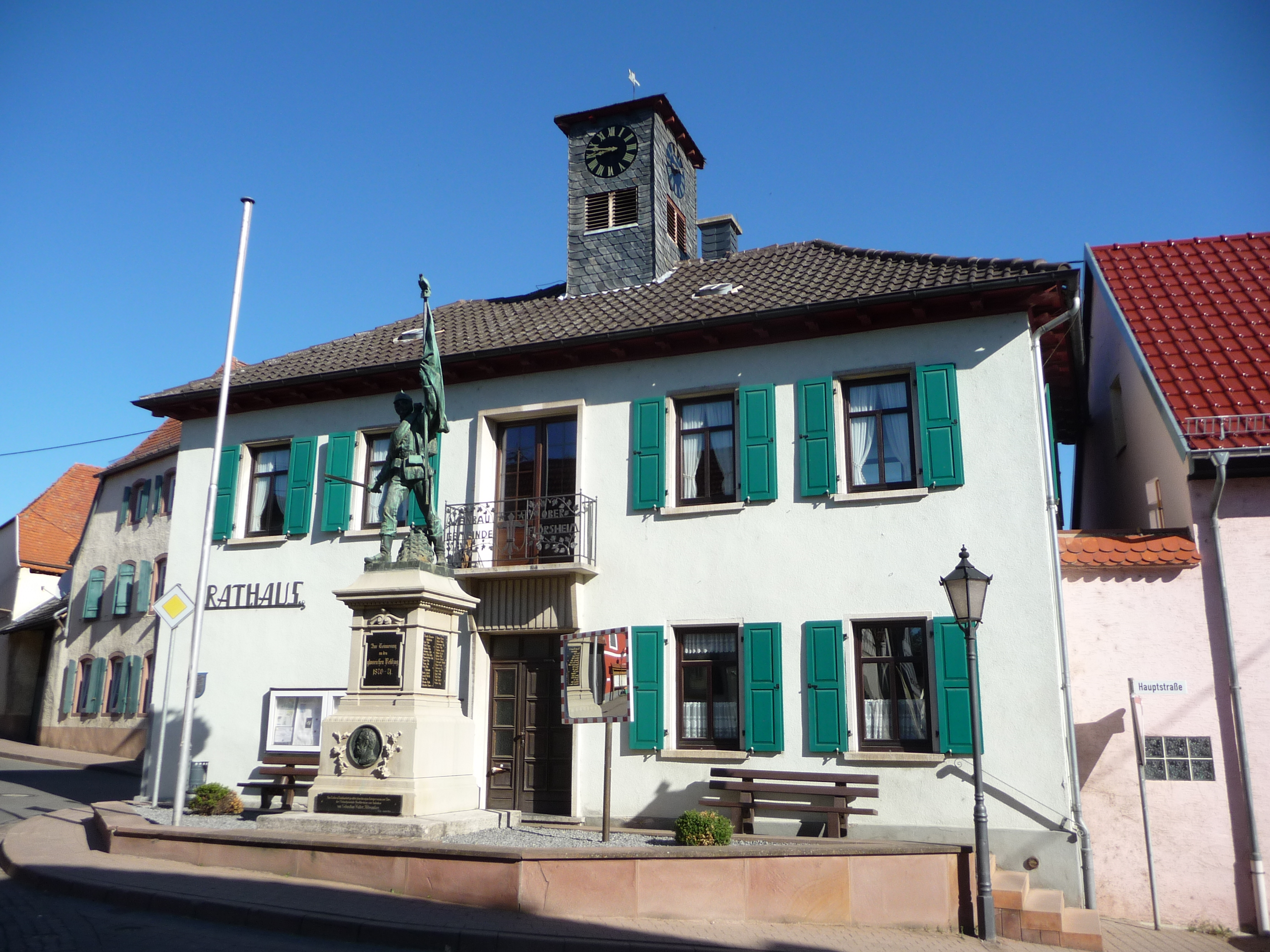 Ober-Flörsheim ist eine Ortsgemeinde im Landkreis Alzey-Worms in Rheinland-Pfalz.